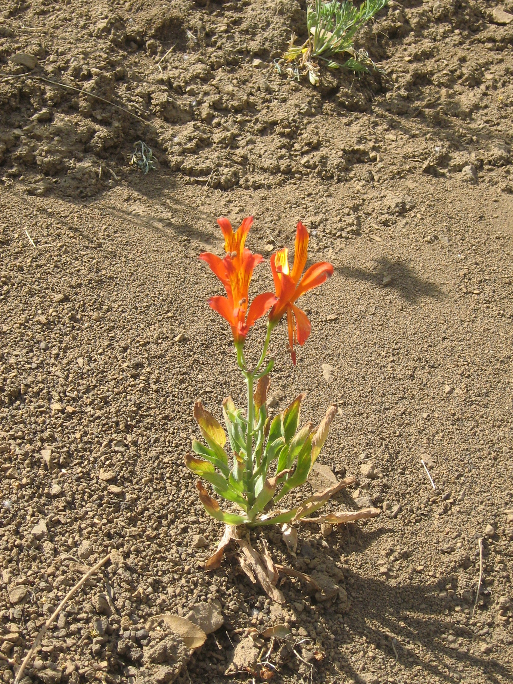 Alstroemeria ligtu, 1200 masl, Central Chile.